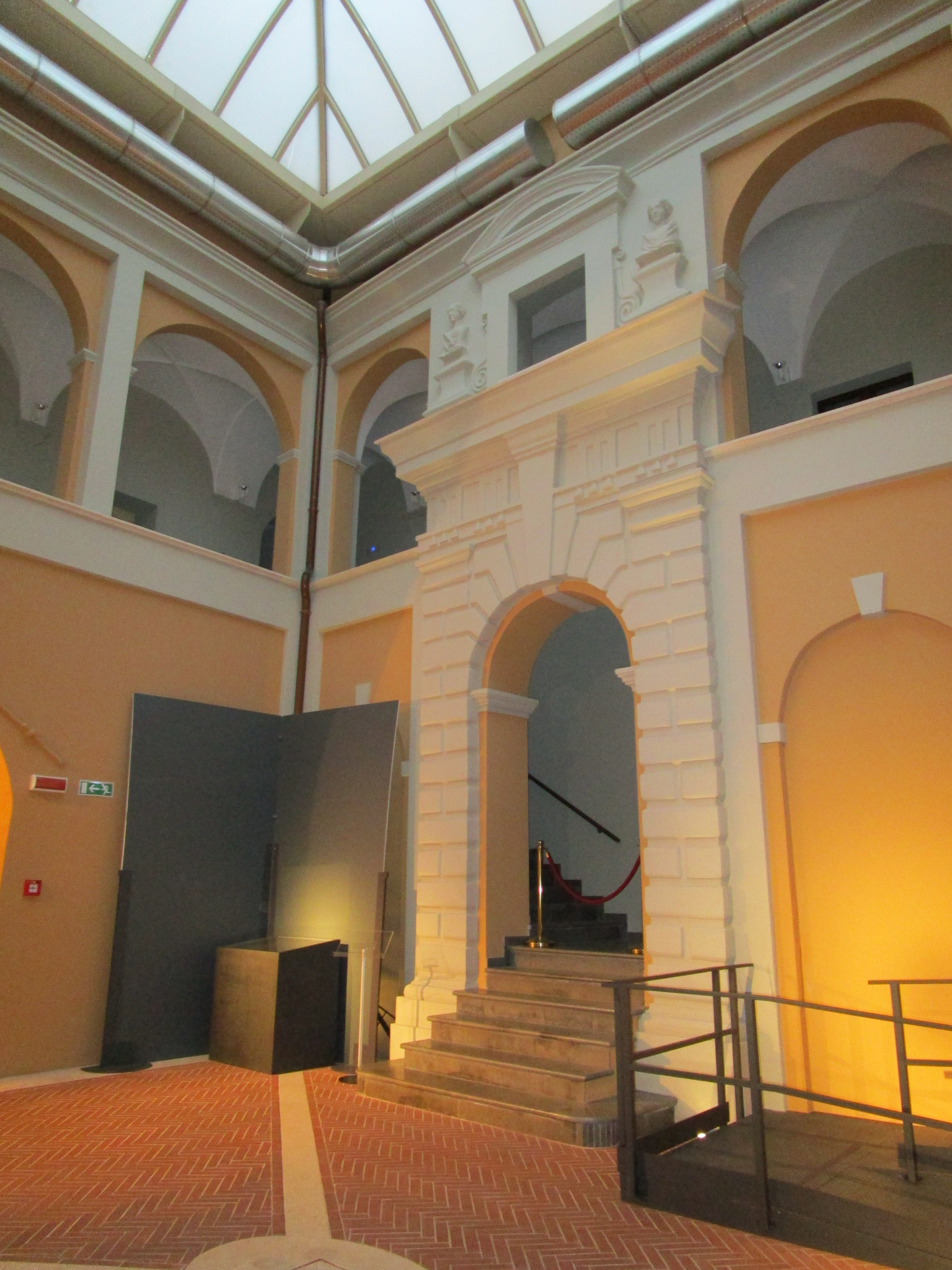 Cortile interno di Palazzo de' Mayo, residenza nobiliare di Chieti.